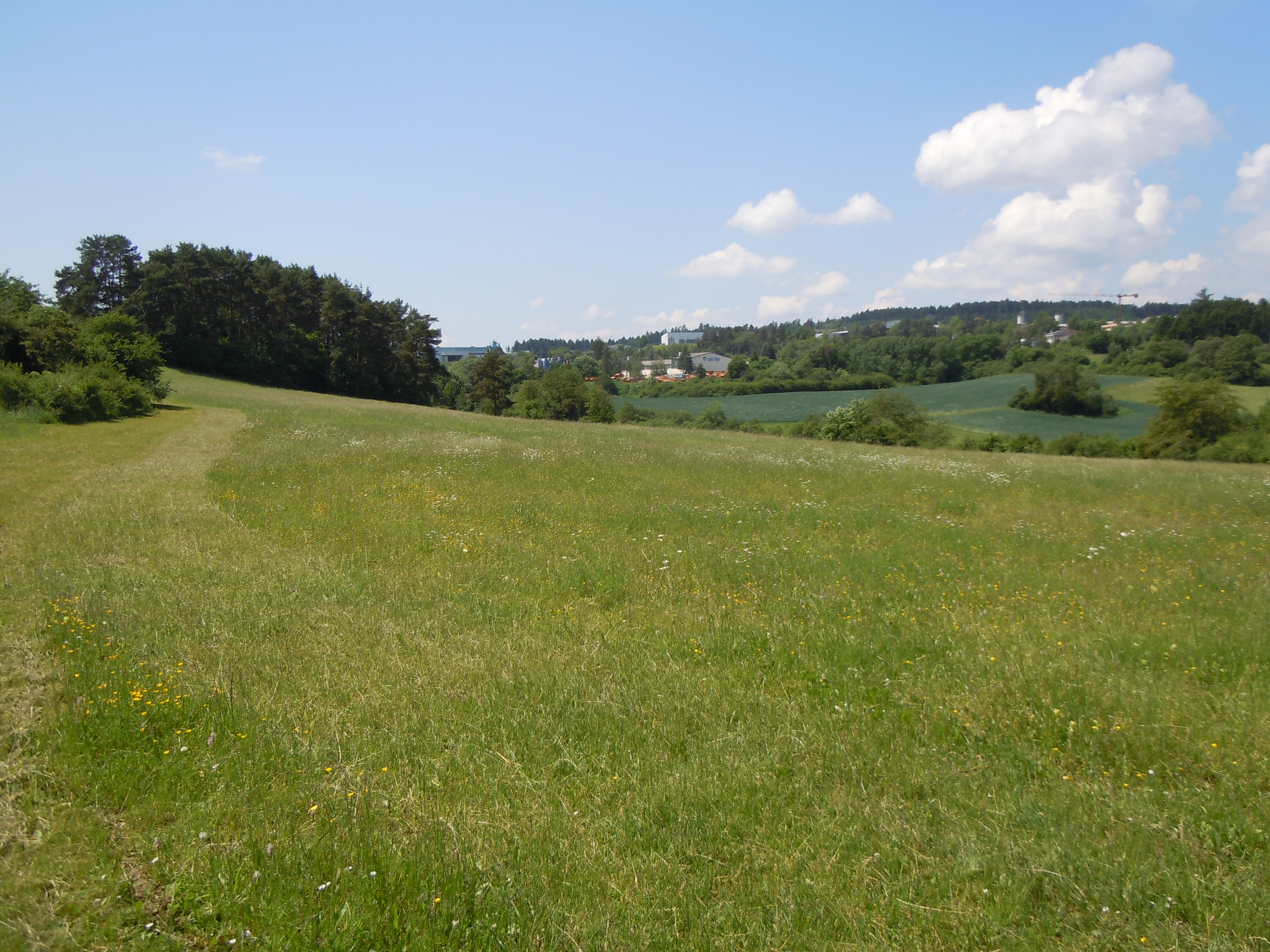 NSG Haiterbacher Heckengäu (Teilgebiet Ganzenrain) mit Halbtrockenrasen, Hecken und Büschen. Im Hintergrund das Industriegebiet von Haiterbach